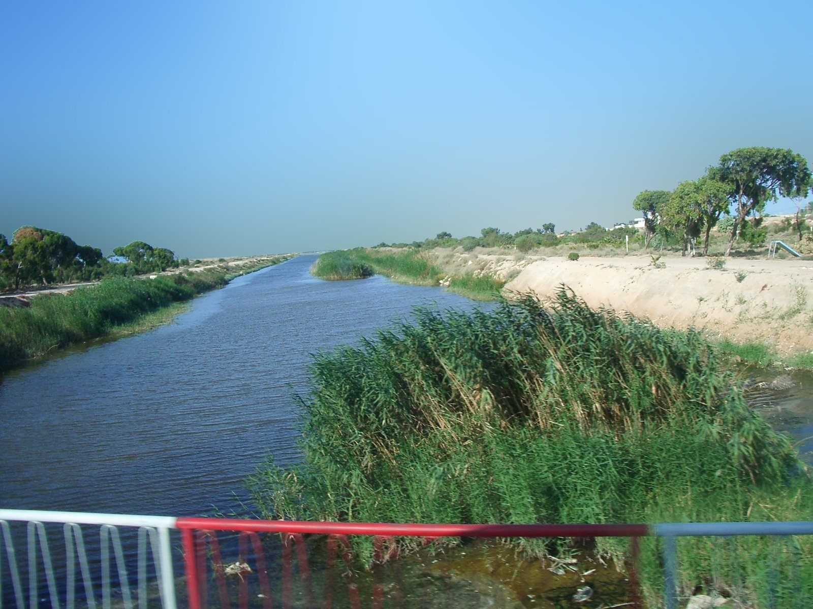 Riu de Gabes al seu pas per la ciutat